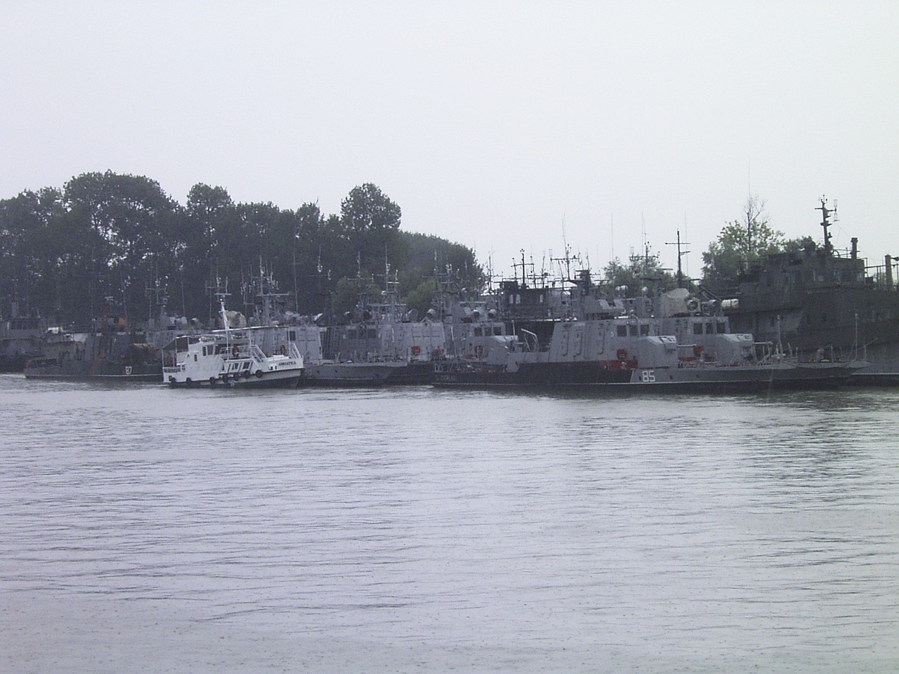 Die rumänische Flussmarine vor Anker in Tulcea